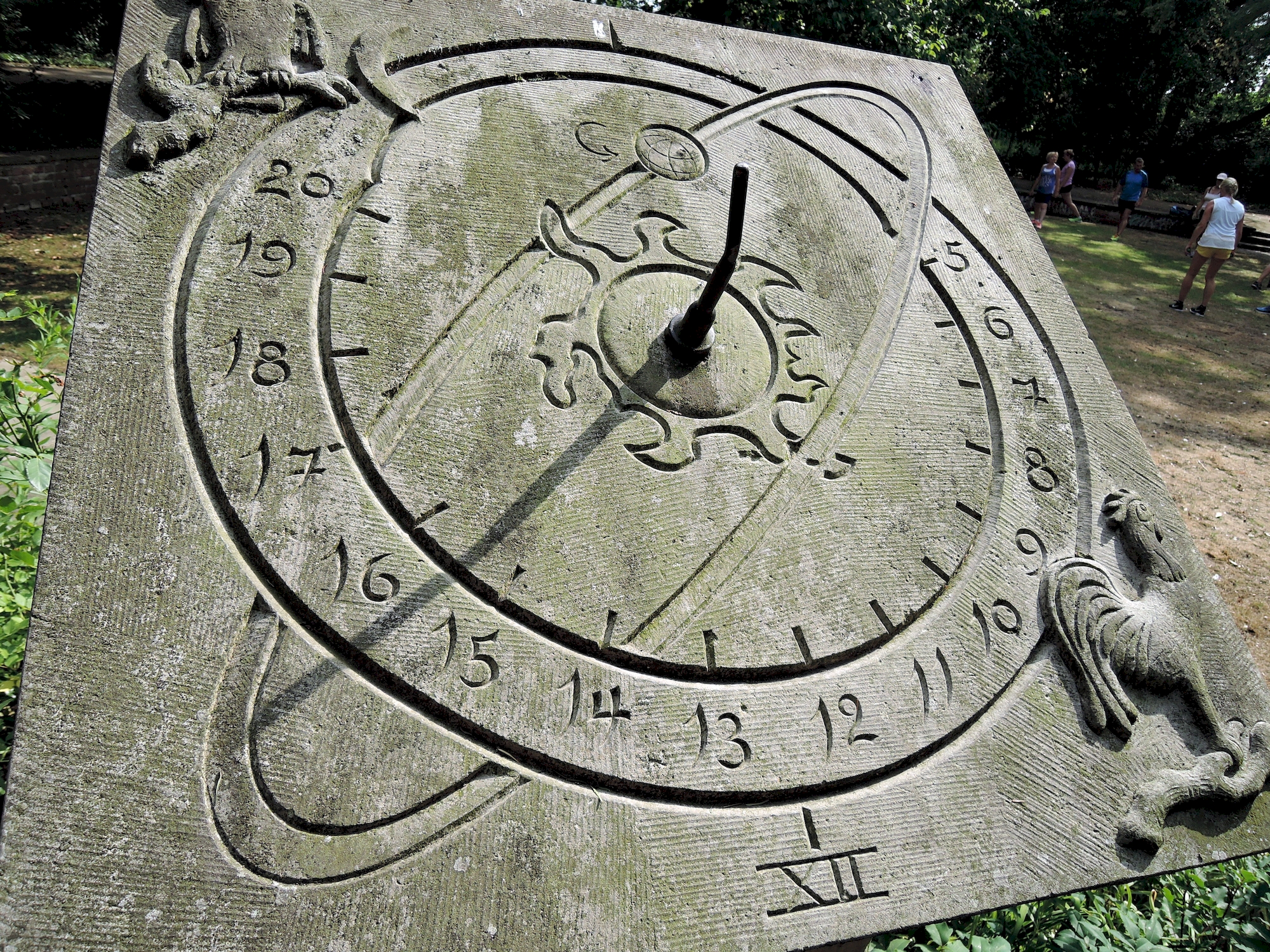 August Tölken, Sonnenuhr im Focke-Garten, Bremen